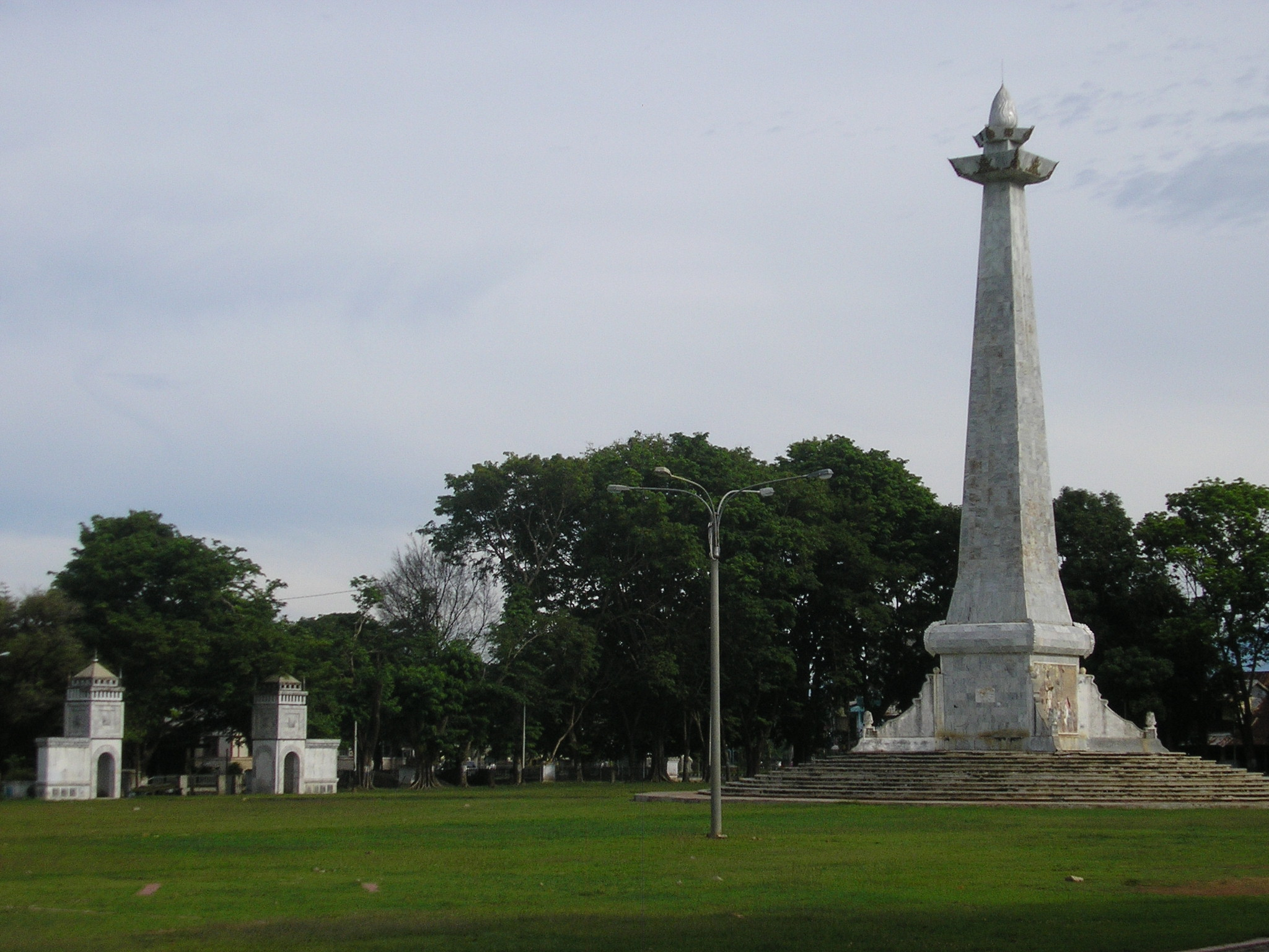 City Square, Bengkulu, Indonesia